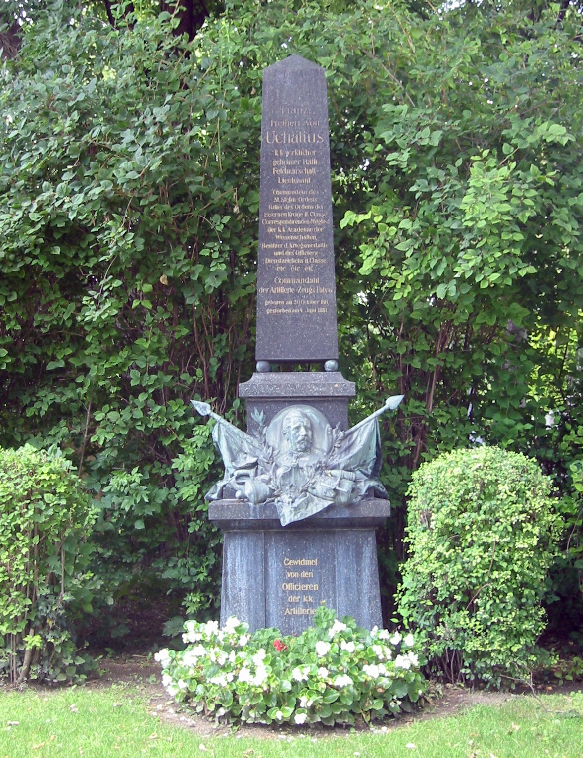 Grab von Franz Uchatius am Wiener Zentralfriedhof